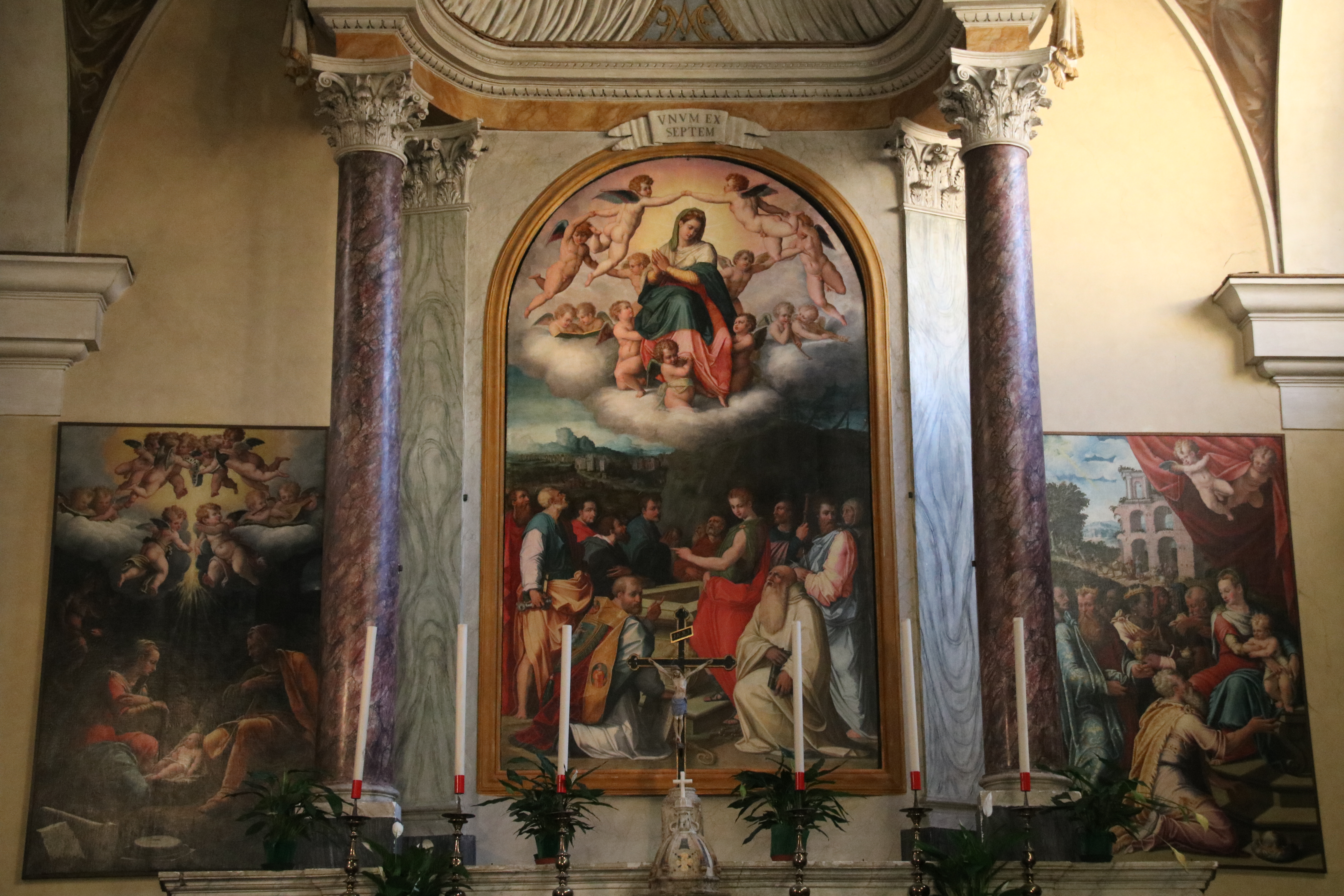 Natività di Orazio Porta - Assunzione di Giorgio Vasari del 1539 - Adorazione dei Magi di Orazio Porta_ Chiesa di Sant’Agostino (Monte San Savino)